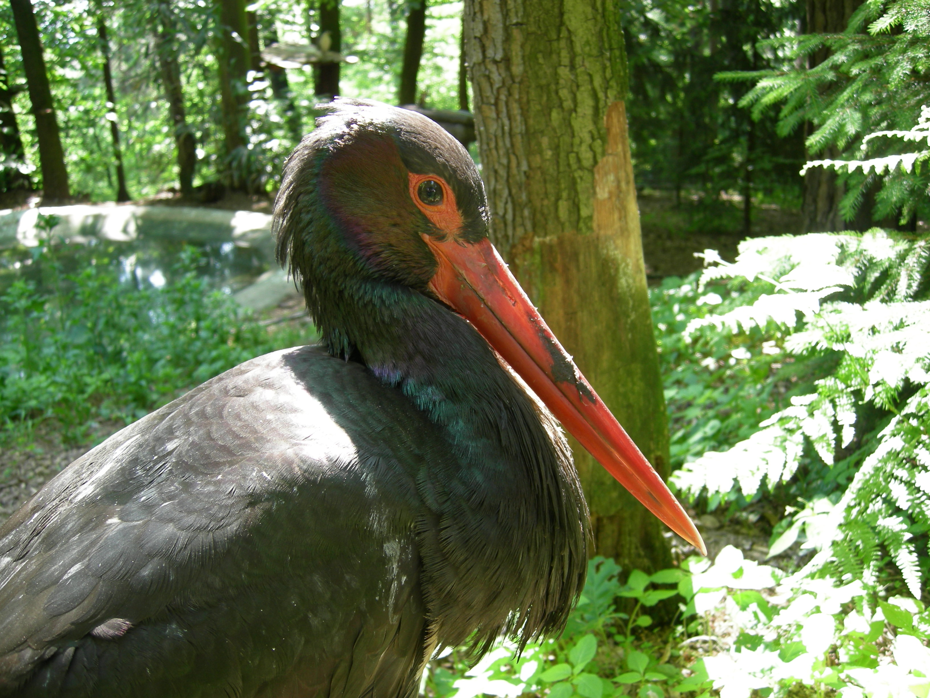 Ciconia_nigra in ZOO Ljubljana, Slovenia